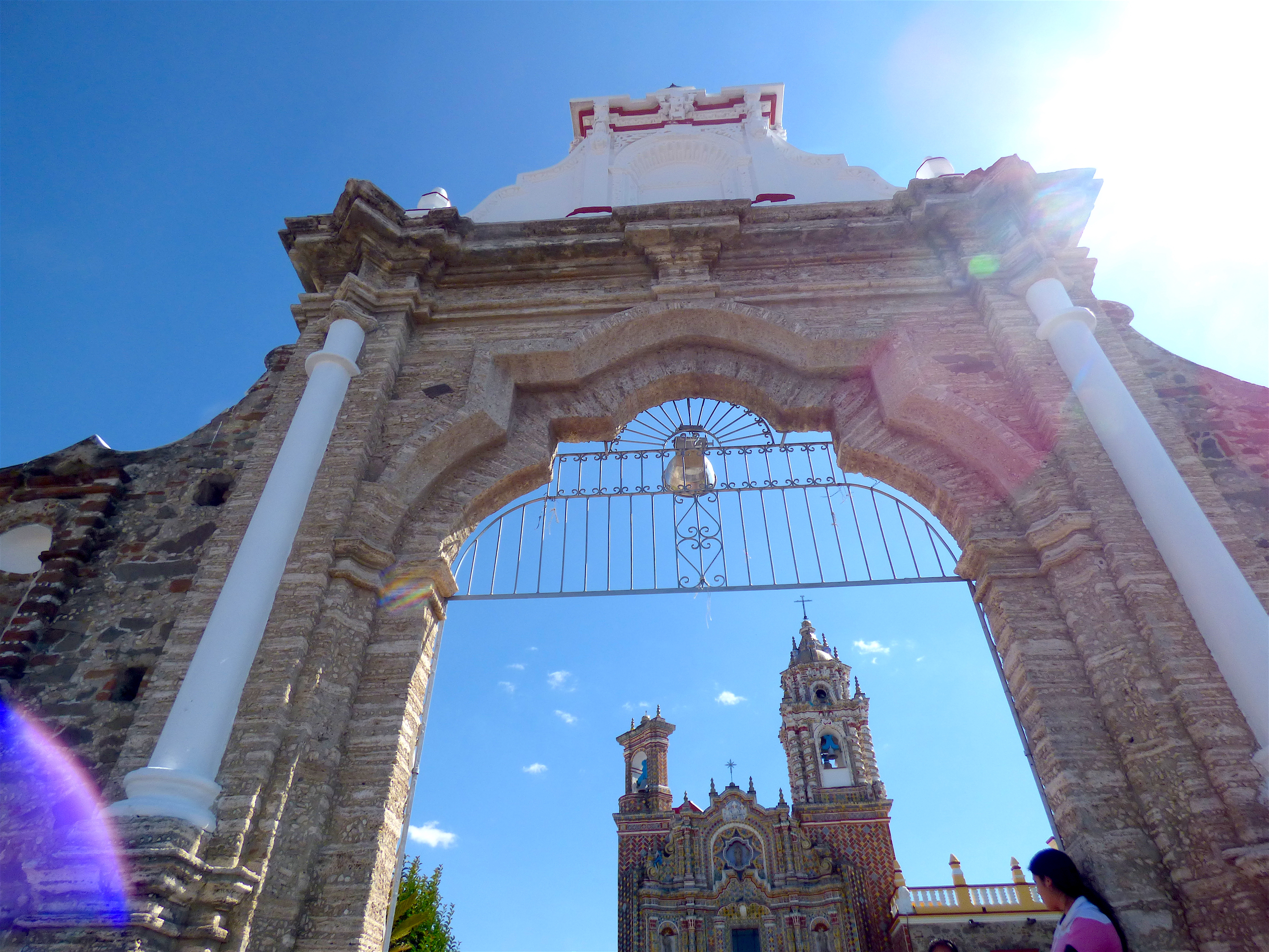 Pórtico del Templo de San Francisco Acatepec